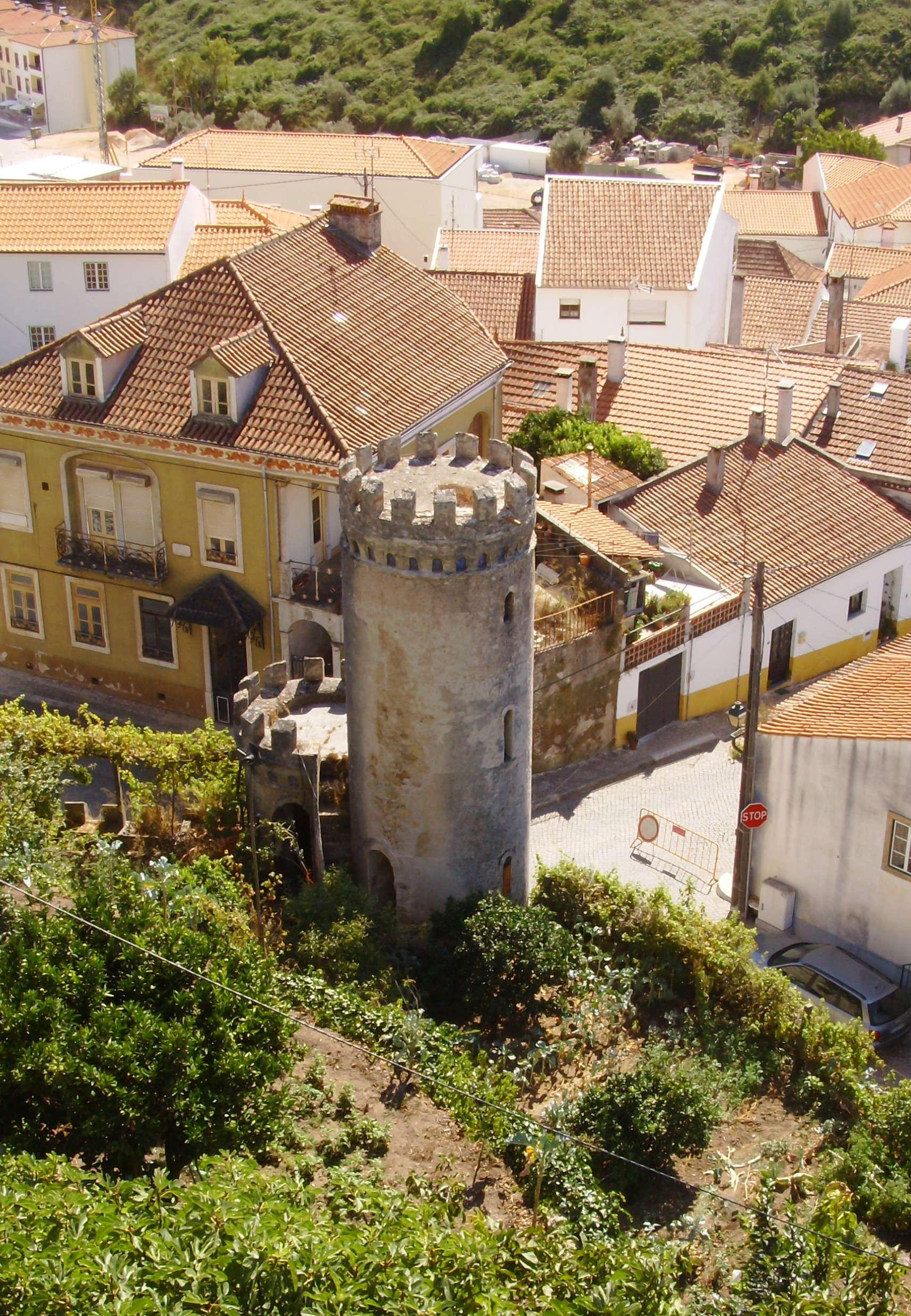 Castelo de Penela, freguesia de Santa Eufémia, concelho de Penela, distrito de Coimbra, Portugal: torre extra-muros.